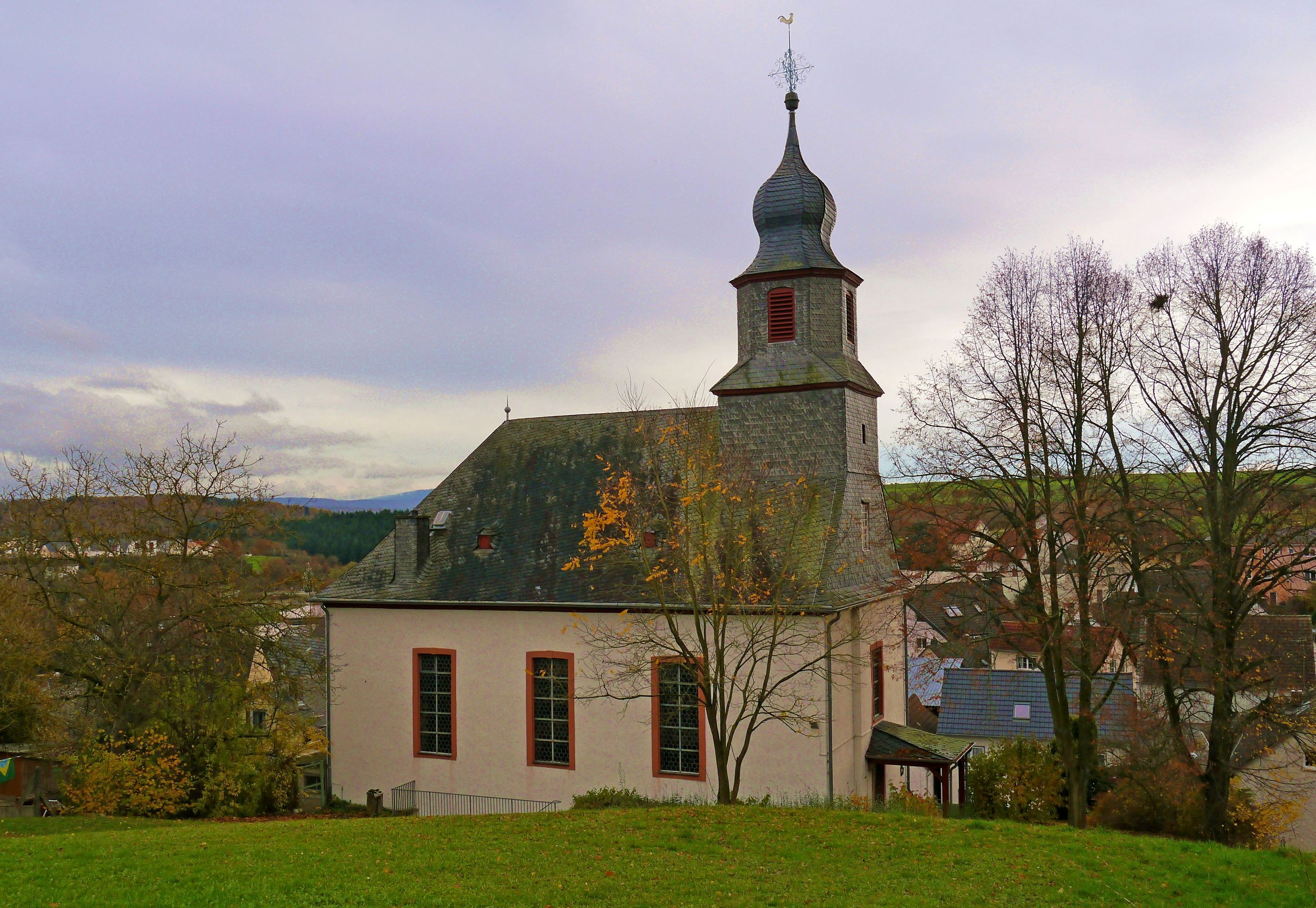 Ansicht der Kirche von Norden